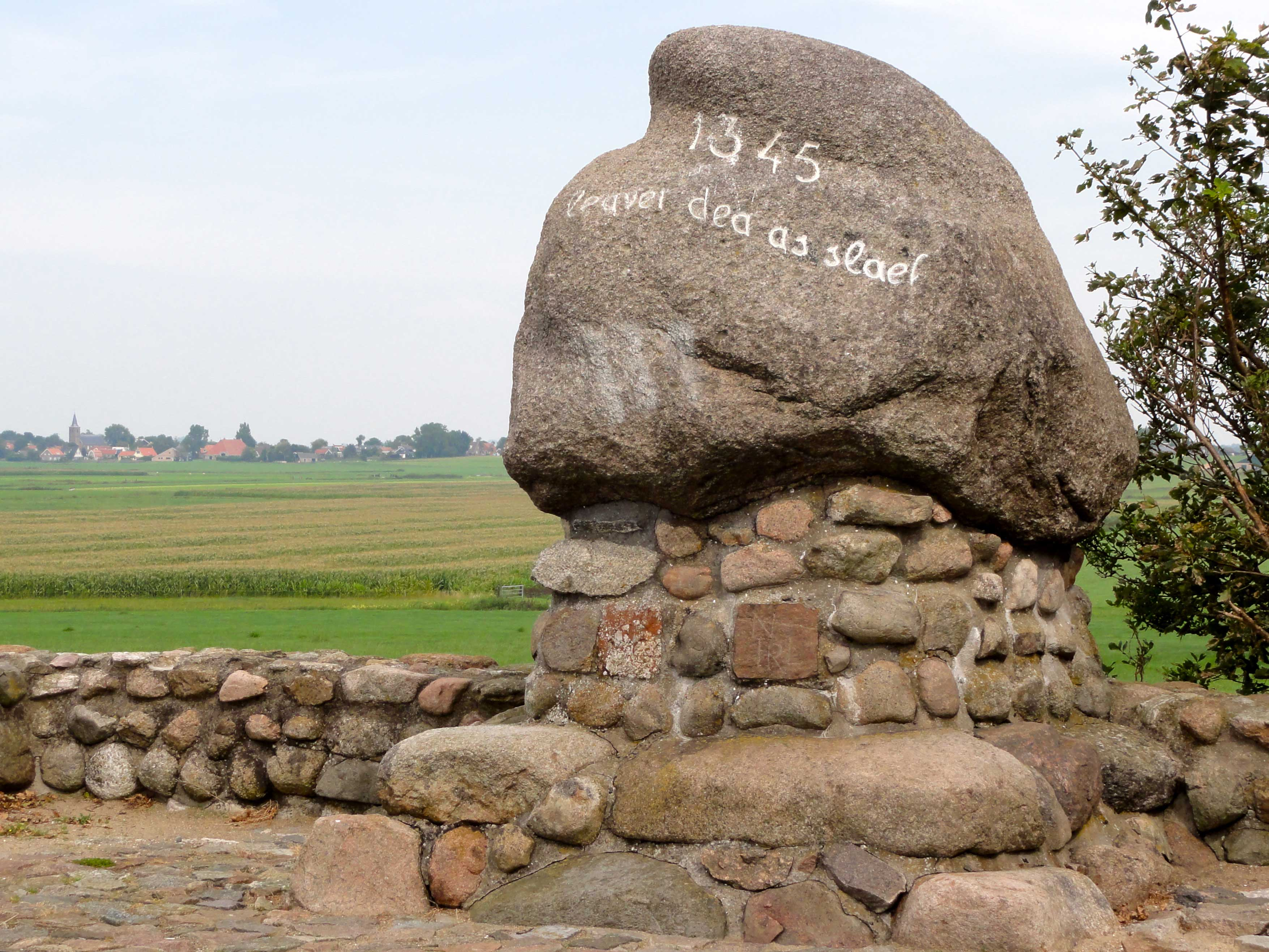 Monument ter herdenking aan de Slag bij Warns in 1345 op het Roode Klif - Leaver dea as slaef (Liever dood dan slaaf) door Arjen Witteveen